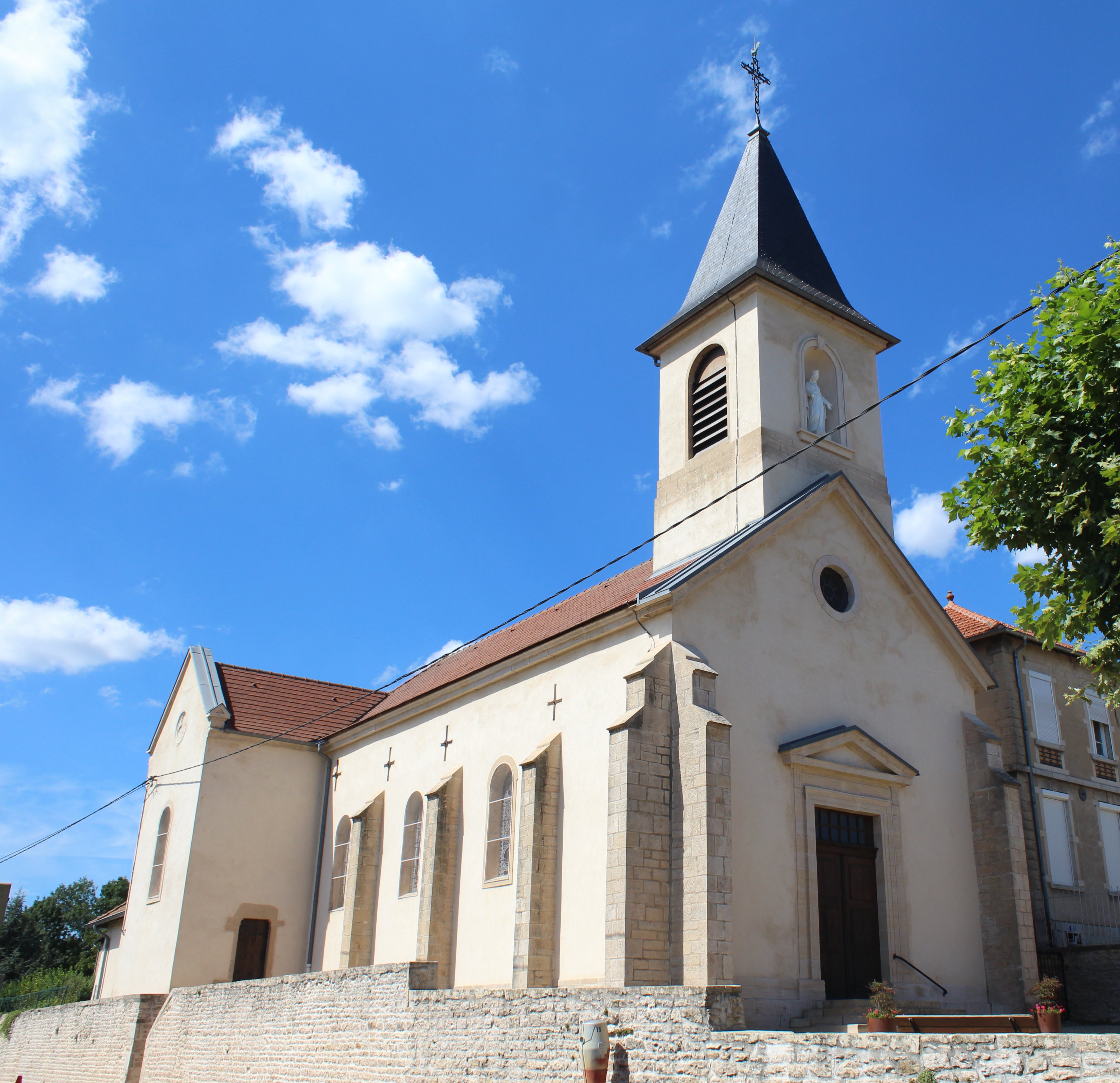 Église Notre-Dame-de-l'Assomption de La Salle, Saône-et-Loire.